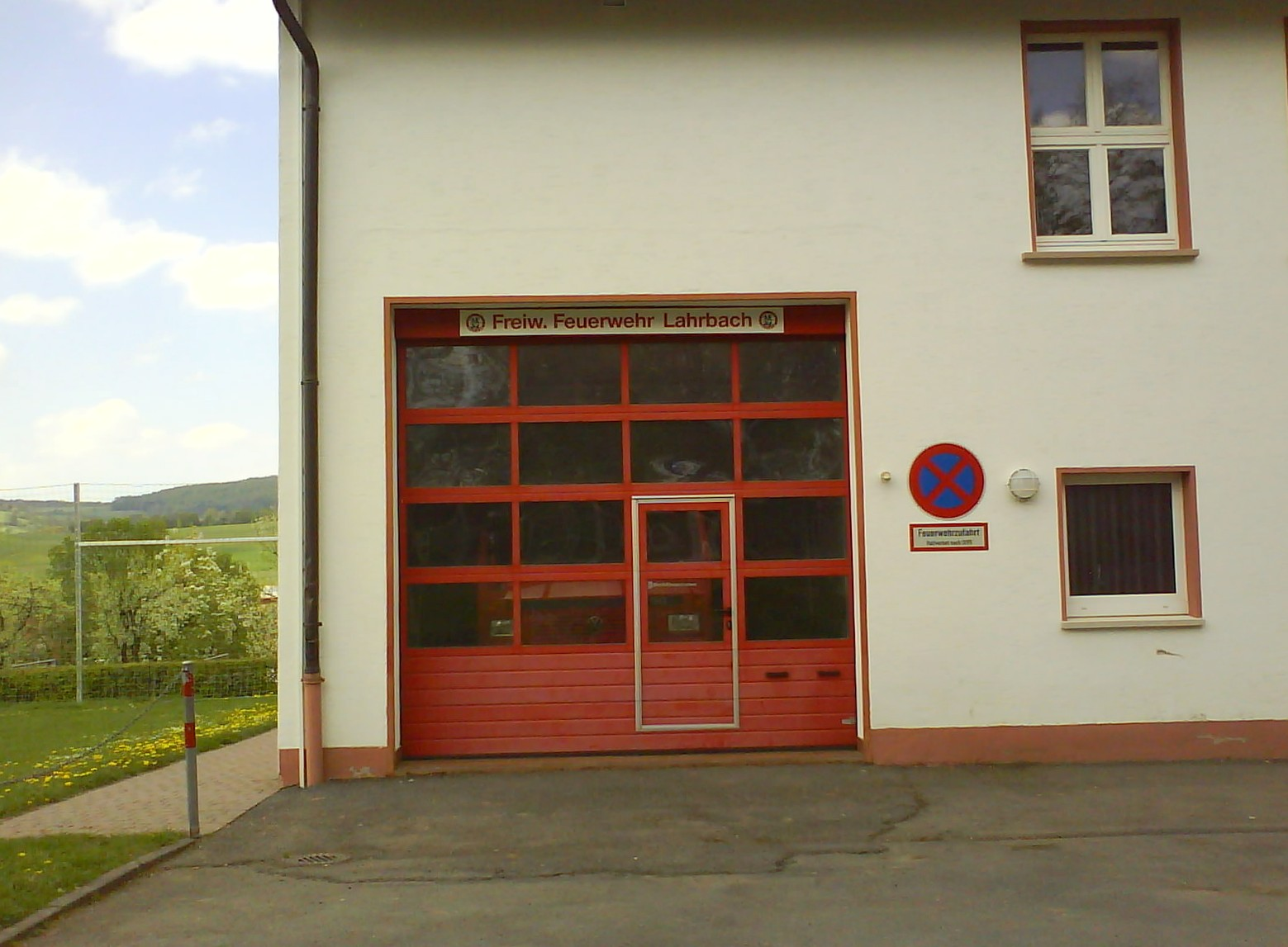 Feuerwehrhaus in Lahrbach (Tann/Rhön)